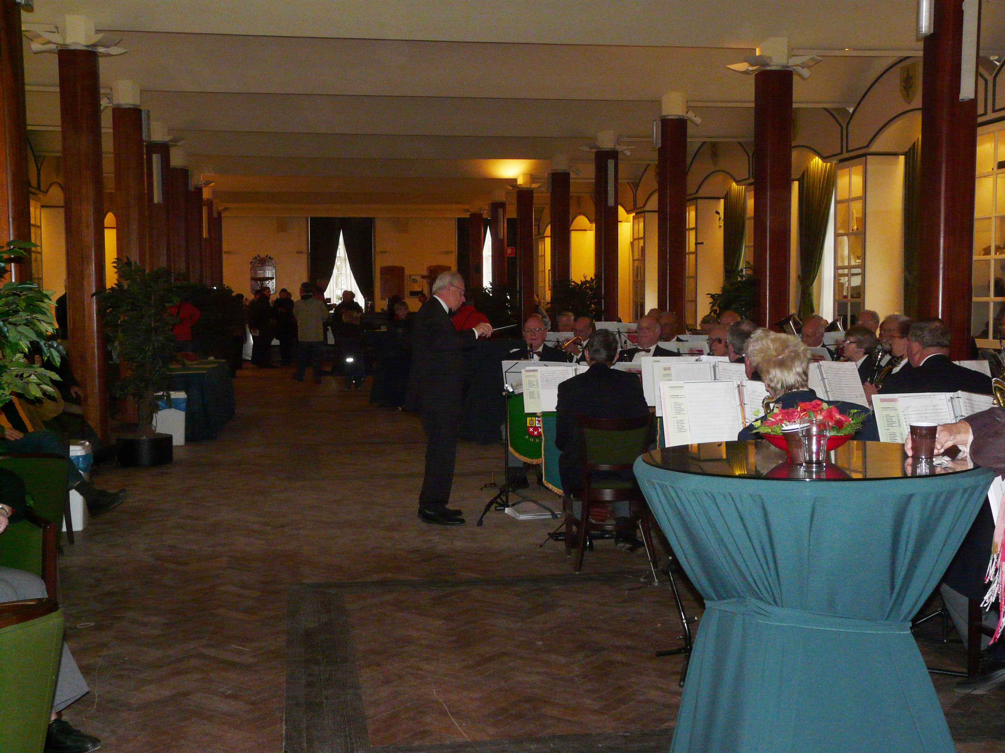 Grote Zaal van het Kasteel van Breda, Breda Centrum in Breda